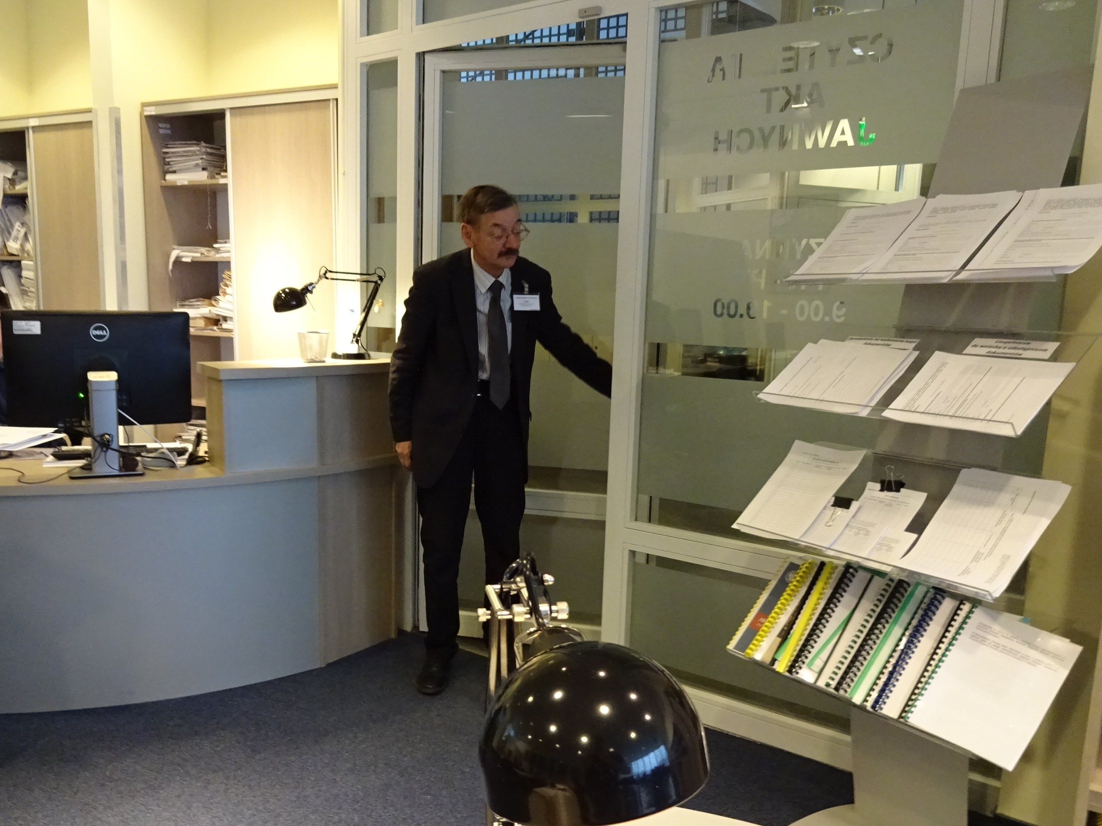 Jerzy Targalski wchodzi do czytelni IPN przy Pl. Krasińskich 2017-02-17